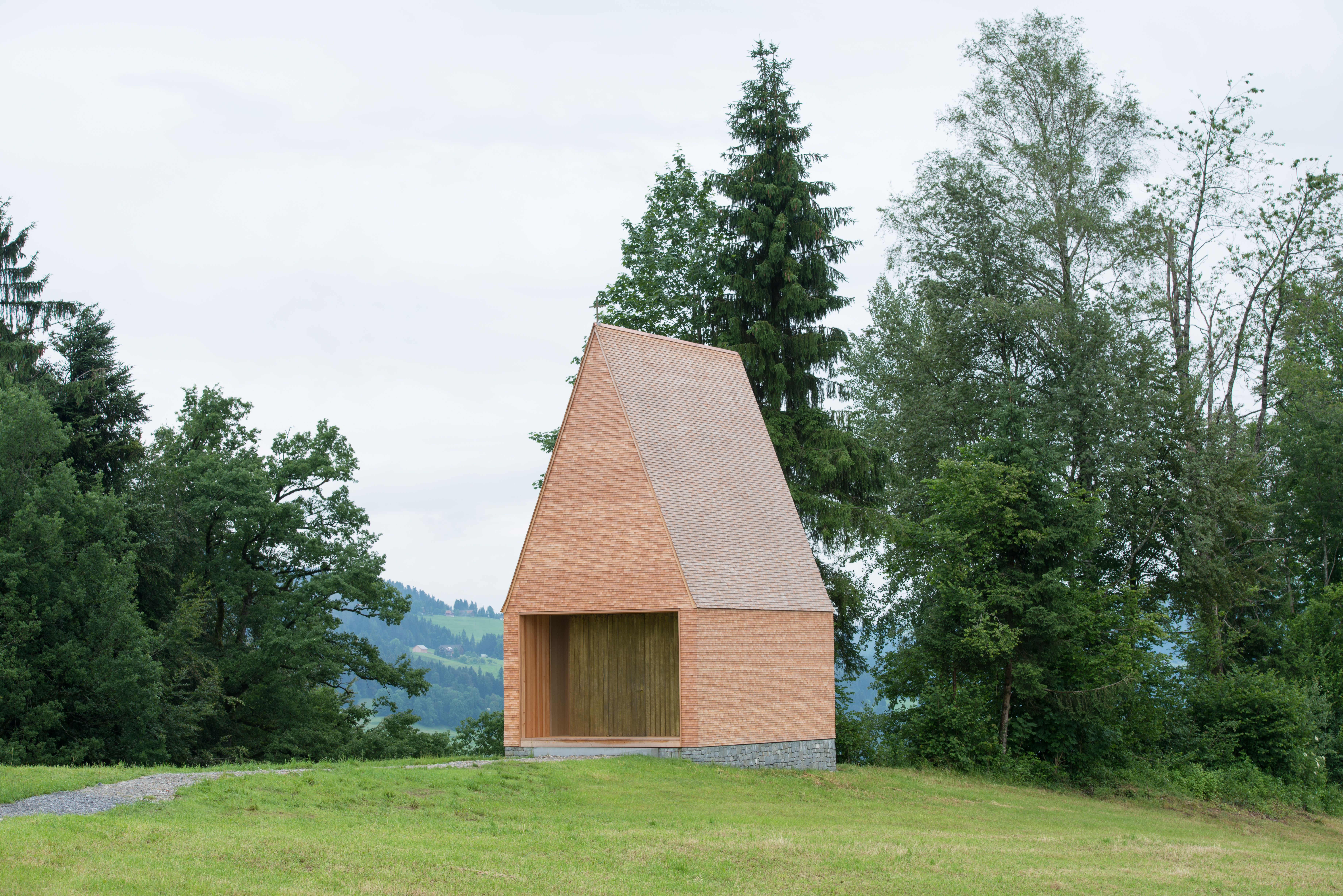 Die Kapelle in der Parzelle Salgenreute, 6942 Krumbach, wurde nach Plänen des Architekturbüros Bernardo Bader von heimischen Handwerkern und freiwilligen Helfern errichtet.